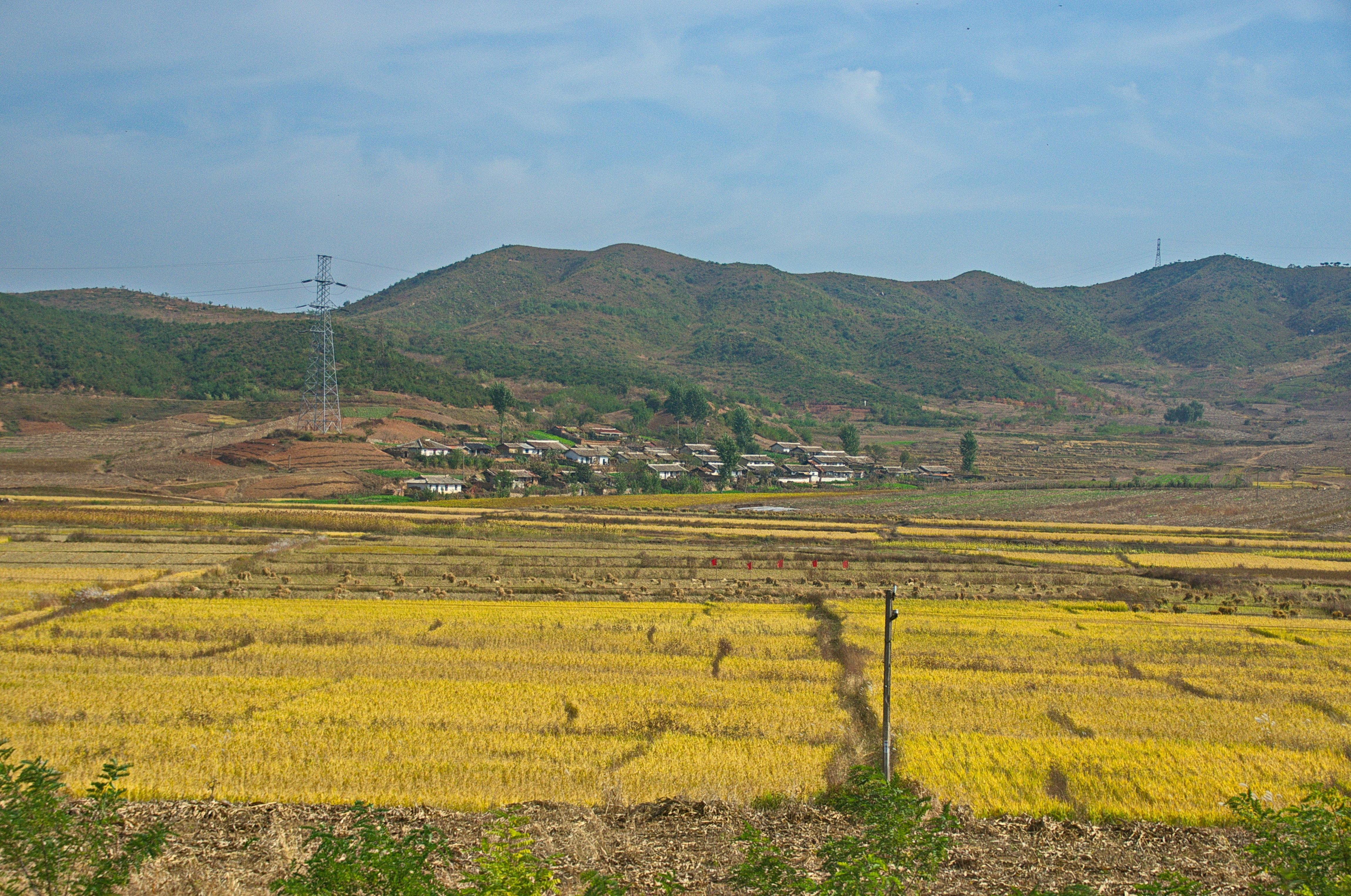 Nordkorea 2015 - Bahnfahrt von Pjöngjang nach China